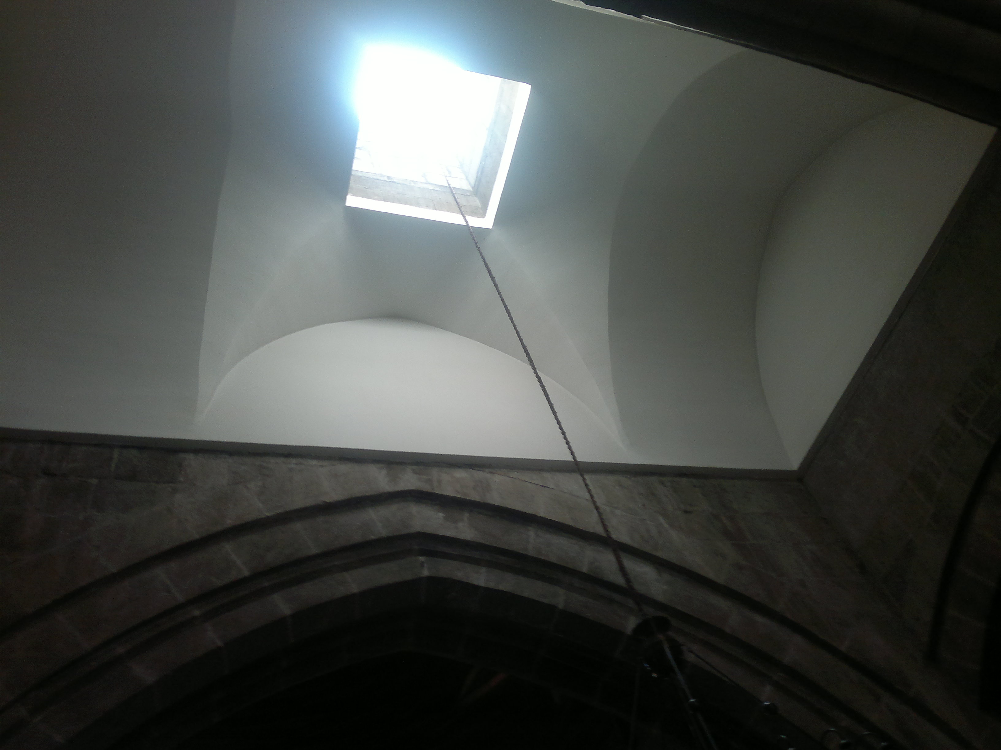 Erzurum Ulu Camii Orta kubbe iç görünüm